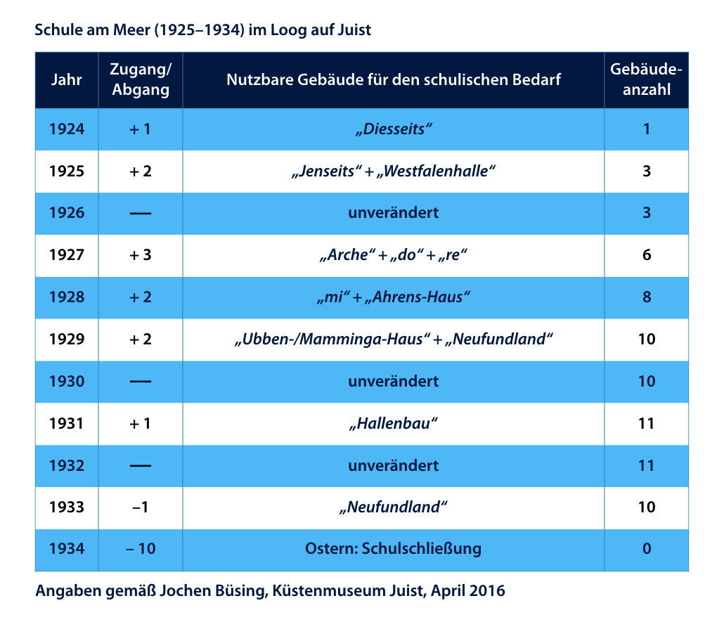 Der reformpädagogischen Schule am Meer (1925–1934) von Martin Luserke auf der Nordseeinsel Juist stand in den einzelnen Jahren ihres Bestehens eine wechselnde Anzahl von Gebäuden zur Verfügung. Der flächenmäßig größte Zuwachs war in den Jahren 1927 (do, re, mi inkl. Ahrens-Haus) und 1931 (Hallenbau) zu verzeichnen. 1933 stockten die Schüler-Neuzugänge aufgrund der geänderten politischen Bedingungen, so dass eine Reduktion um das lediglich gepachtete "Neufundland" (Vermietung an die Schlaffhorst-Andersen-Schule für Sprachförderung) erfolgte.